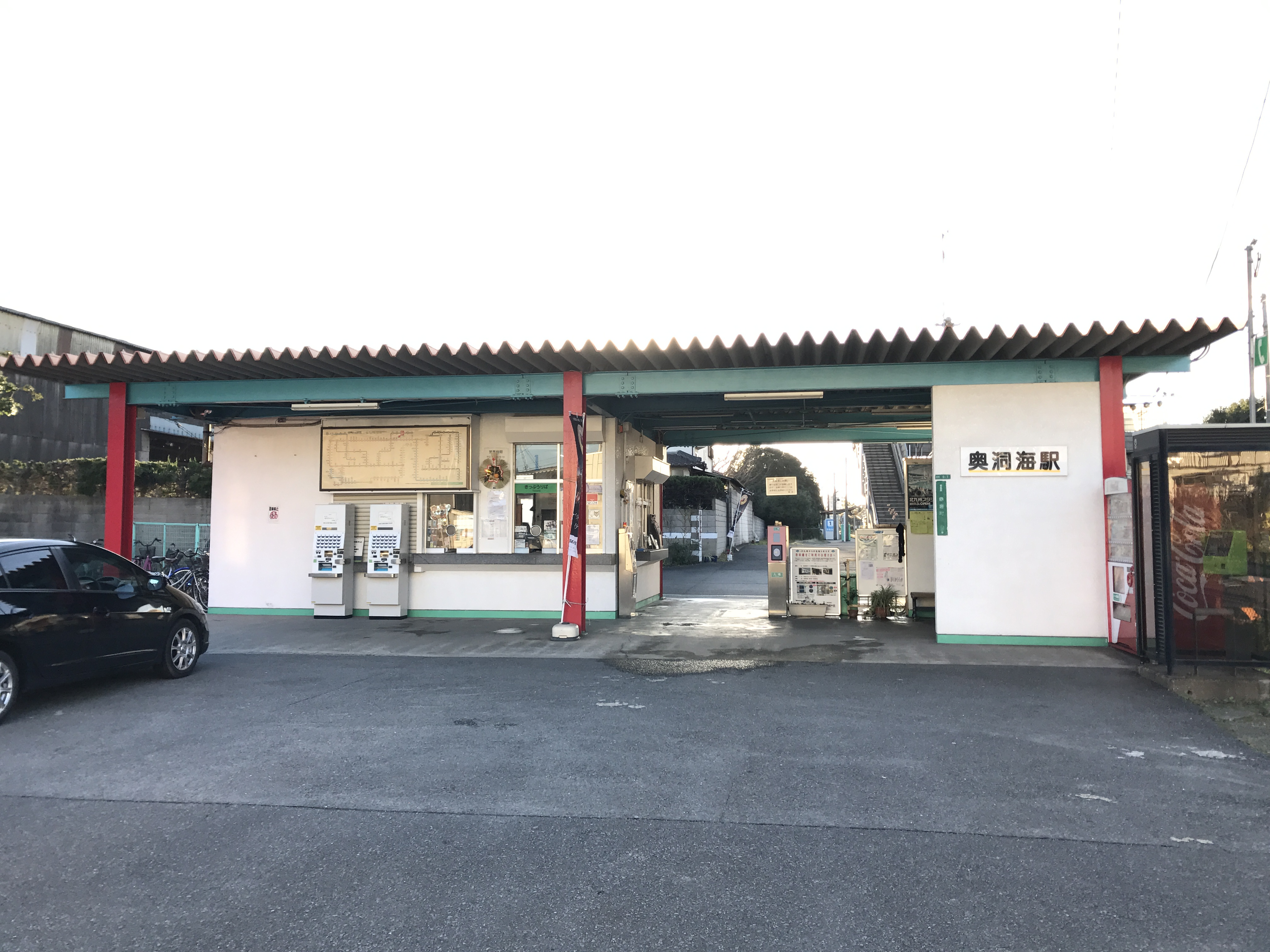 奥洞海駅駅舎